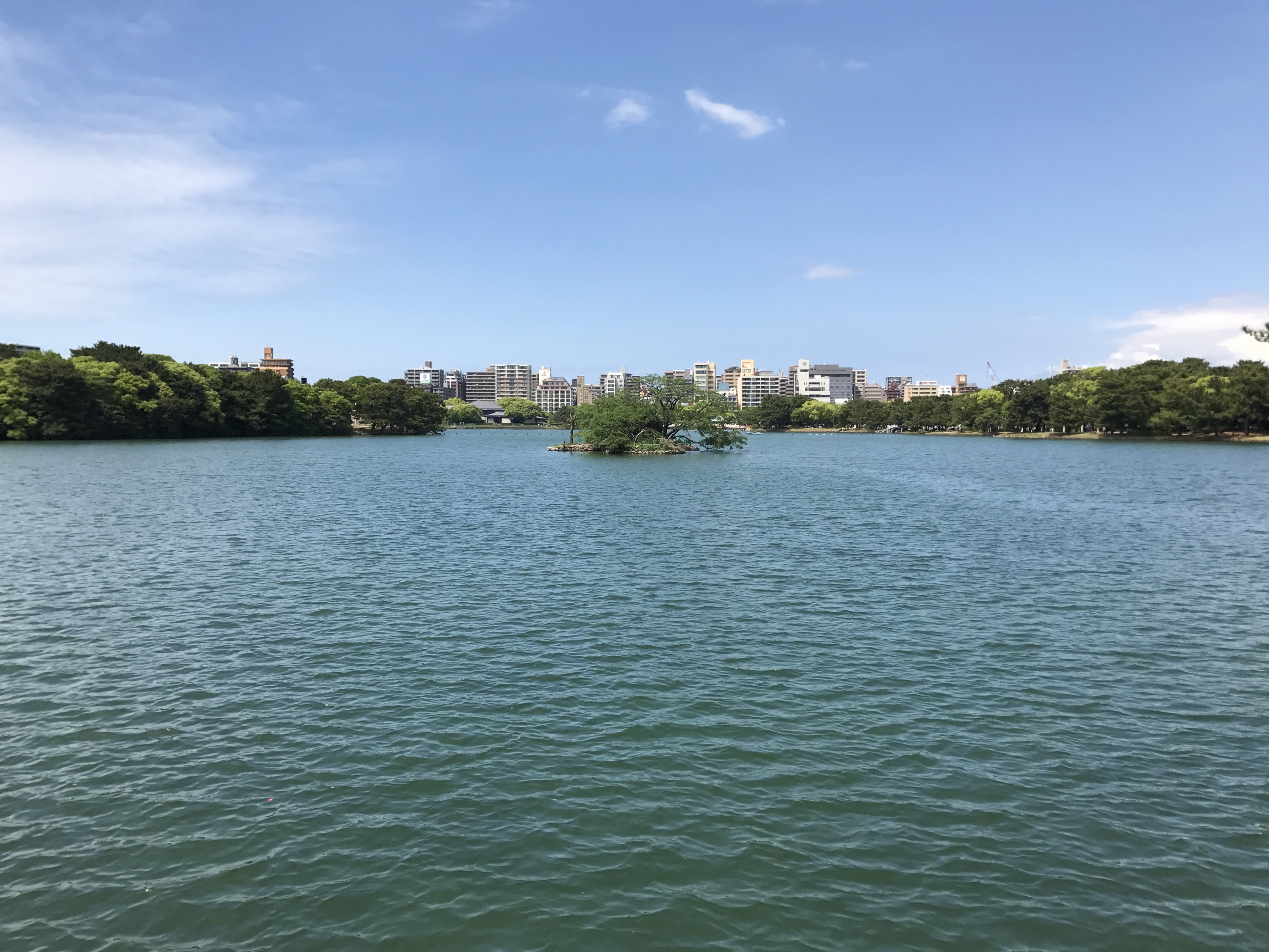 さつき橋より望む大濠公園(鴨島・観月橋方面)